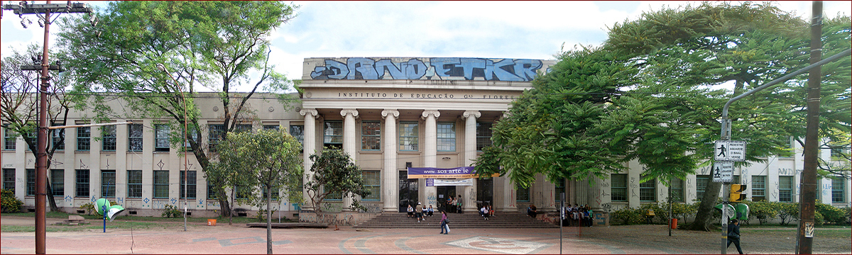 Instituto de Educação Gal. Flores da Cunha. Porto Alegre, Brasil